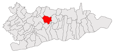 Categorie:Hărţi ale judeţului Călăraşi